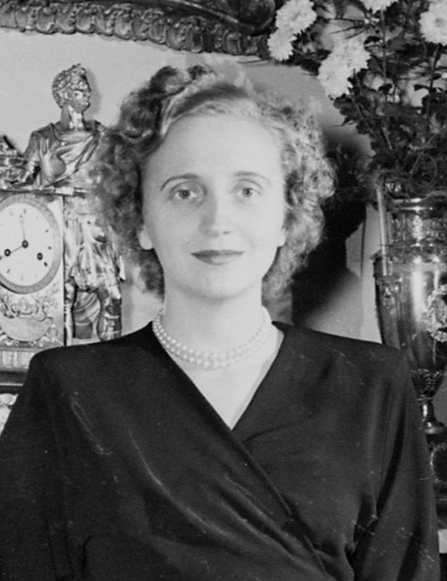 Margaret Truman